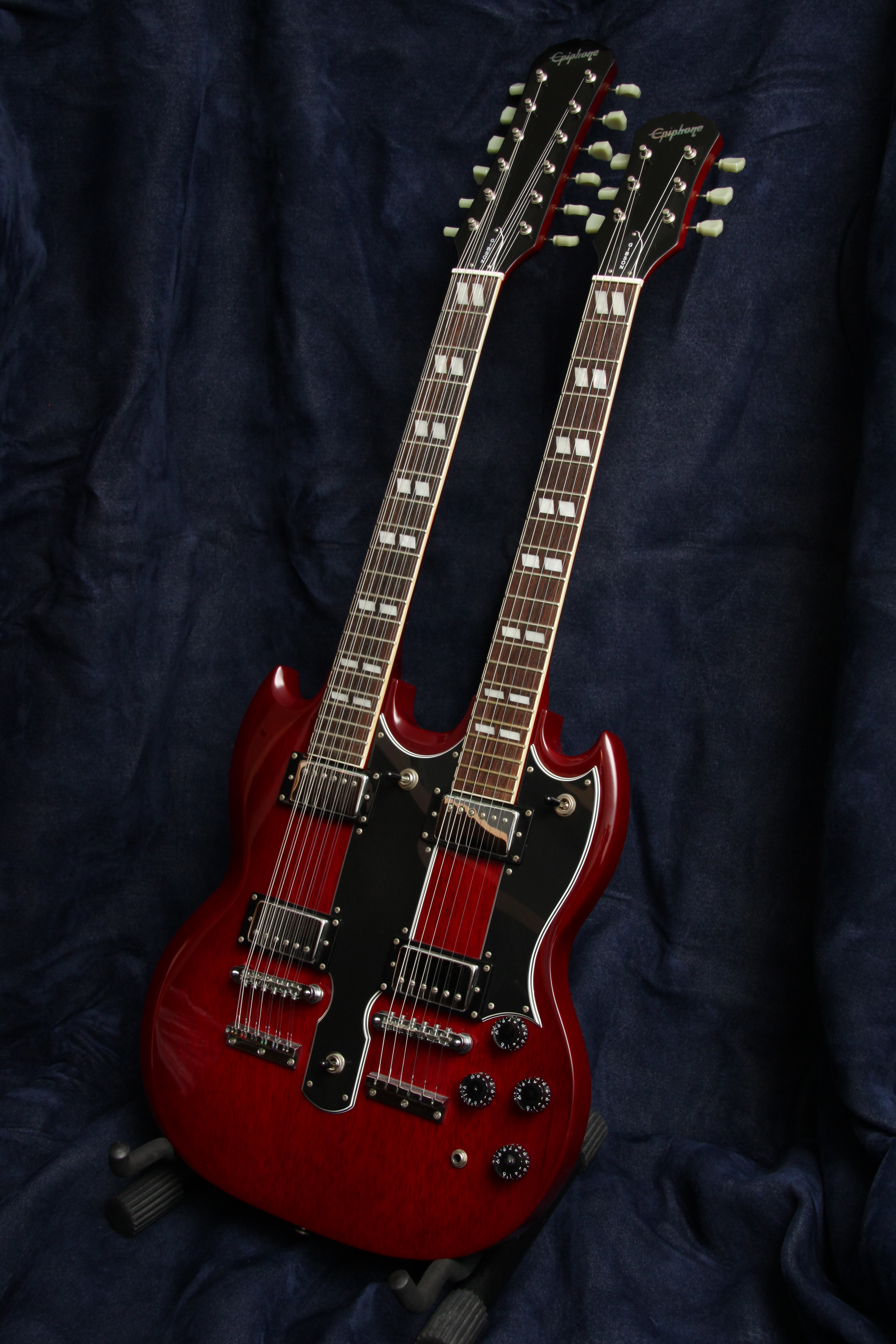 Epiphone G-1275 double neck guitar